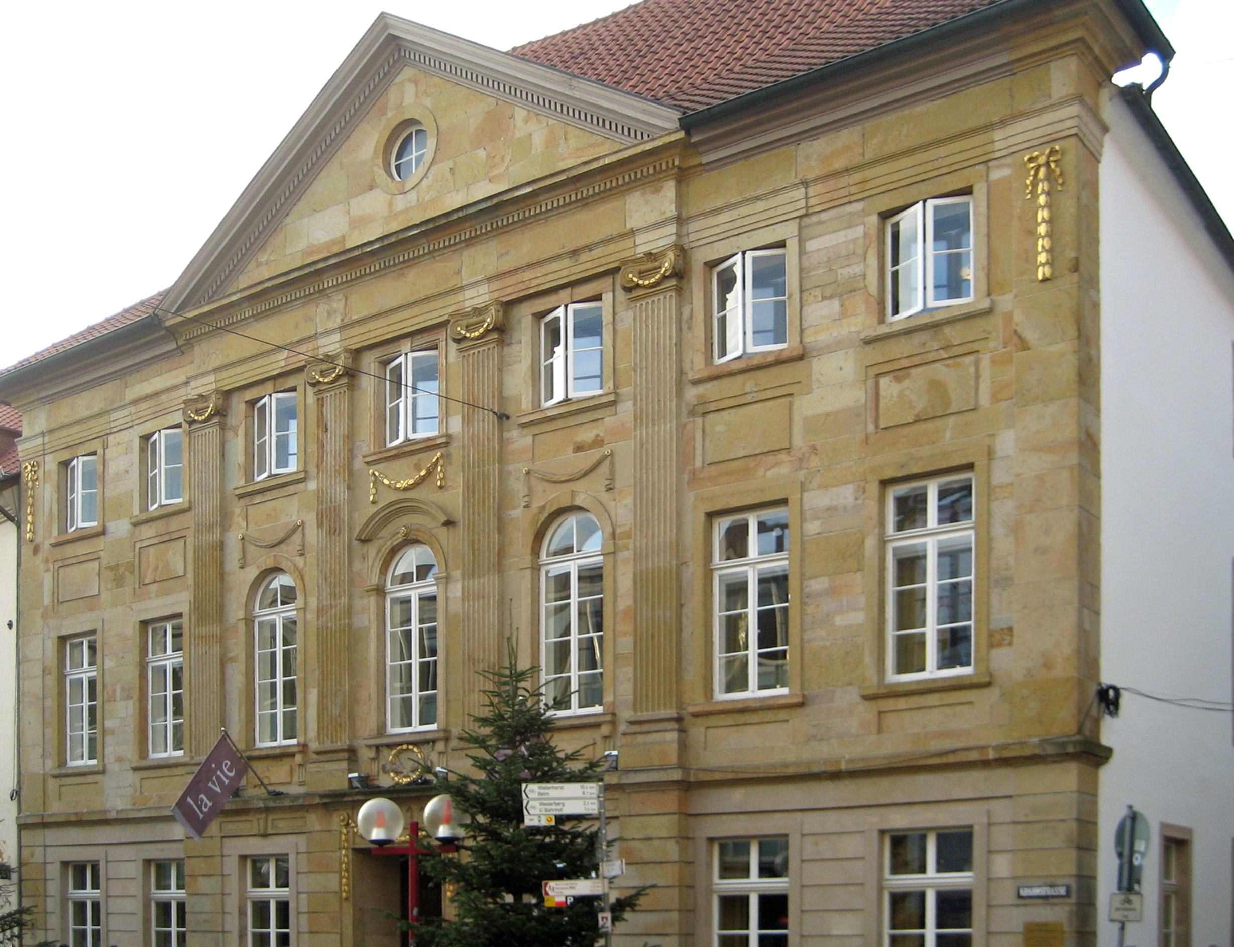 Das klassizistische Haus Tenge in Osnabrück, in dem der Stahlunternehmer und RWE-Vorstandsvorsitzende Jürgen Großmann das Sterne-Restaurant La Vie betreibt